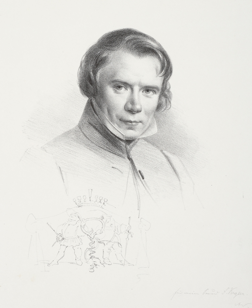 Self-portrait